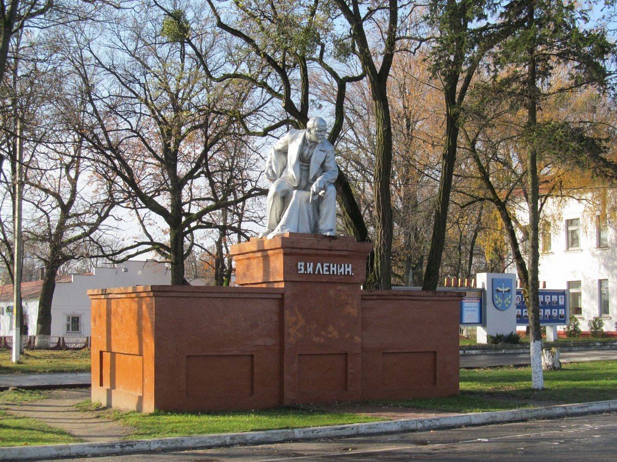 Лельчыцы. Помнік Леніну